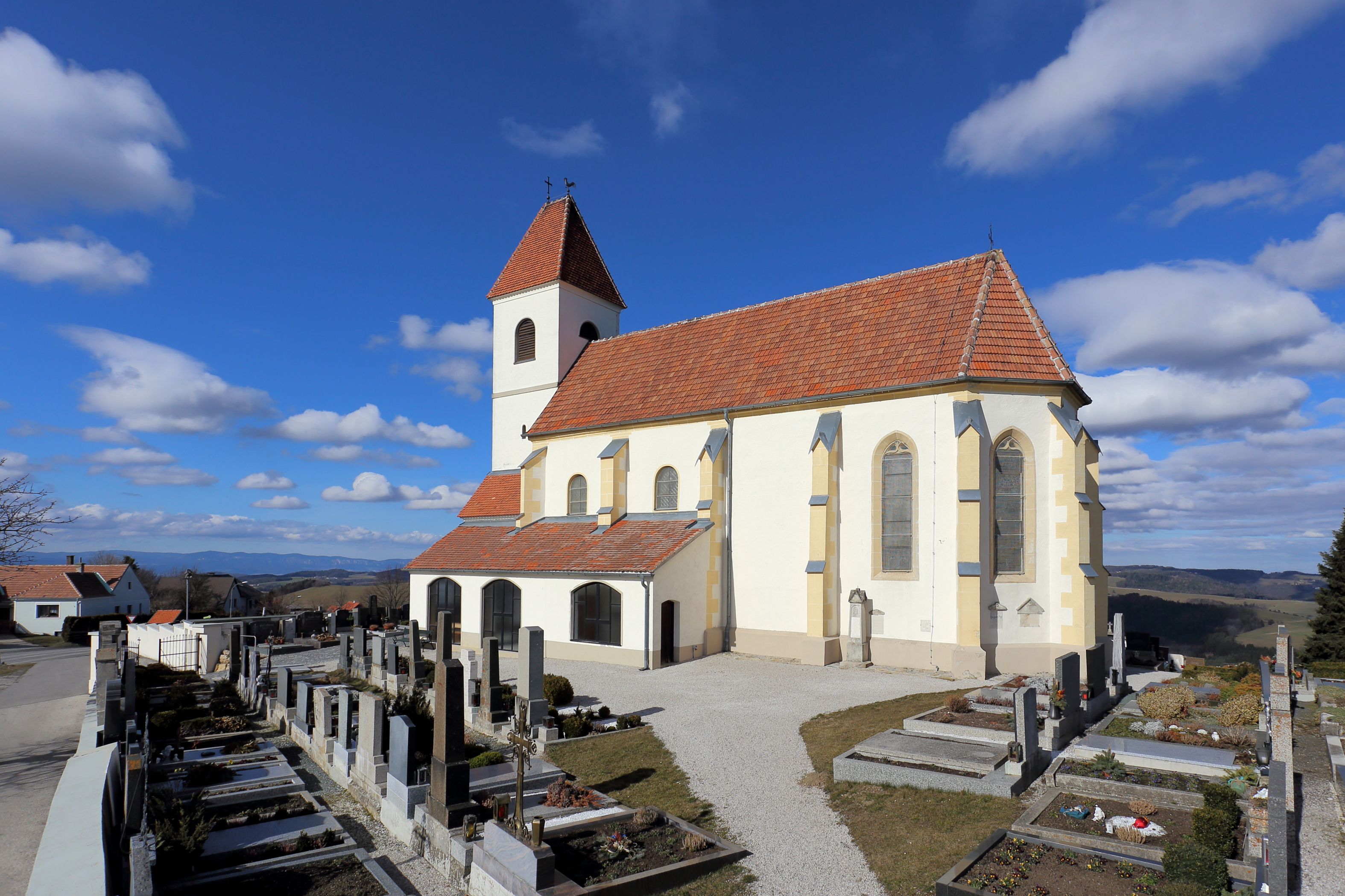 Die Filialkirche St. Anna in Annaberg, ein Ortsteil der niederösterreichischen Gemeinde Wiesmath.